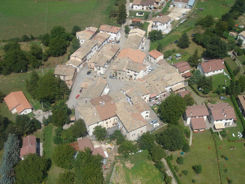 villa lucci aerea 2006